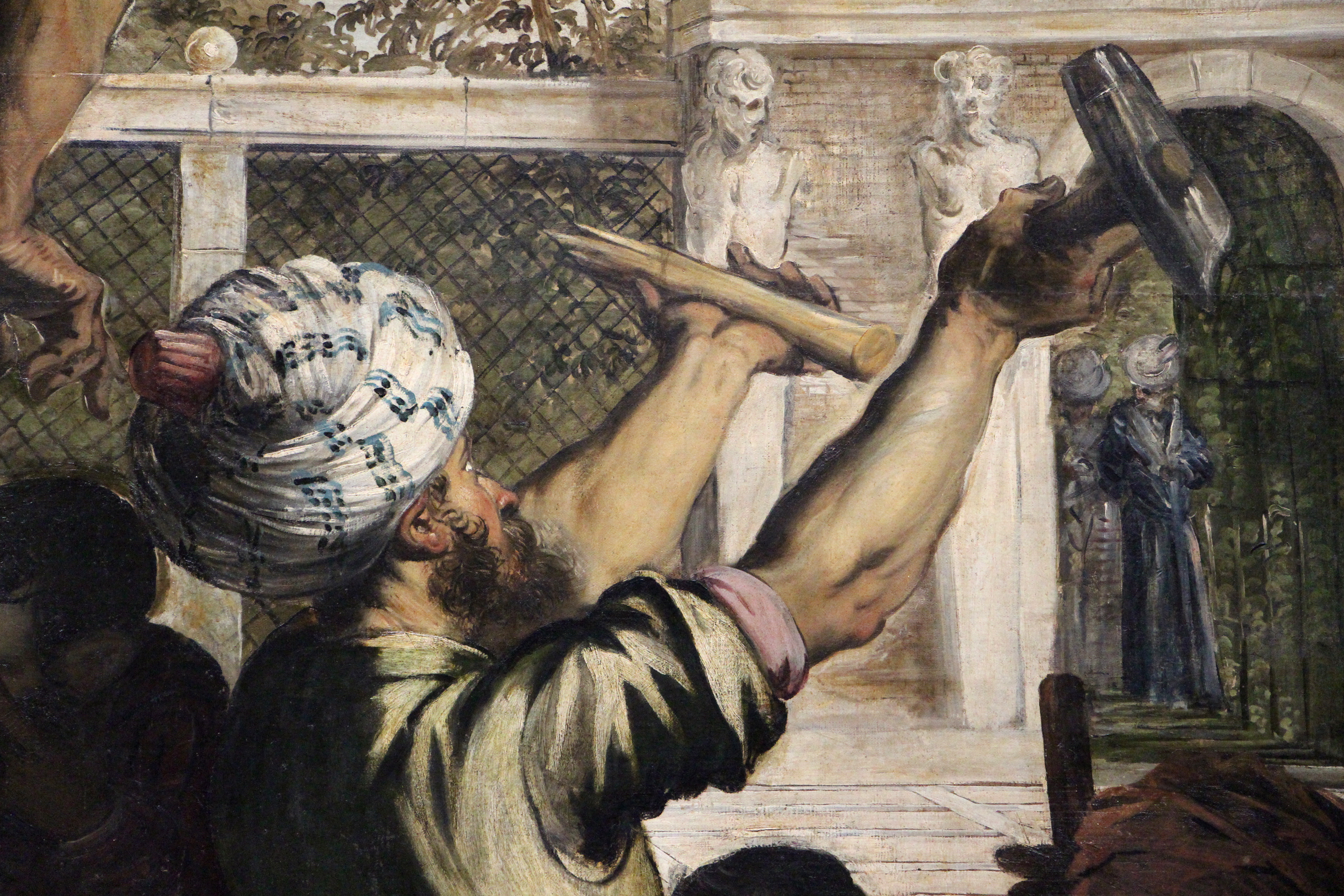 Gallerie dell'Accademia - MIBAC The making of this document was supported by Wikimedia CH. (Submit your project!) For all the files concerned, please see the category Supported by Wikimedia CH. This is a photo of a monument which is part of cultural heritage of Italy.